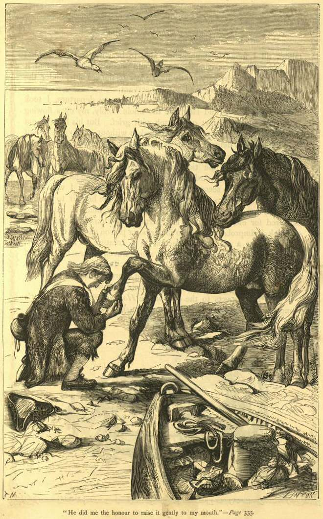 Viagens de Gulliver, Parte IV, Capítulo X